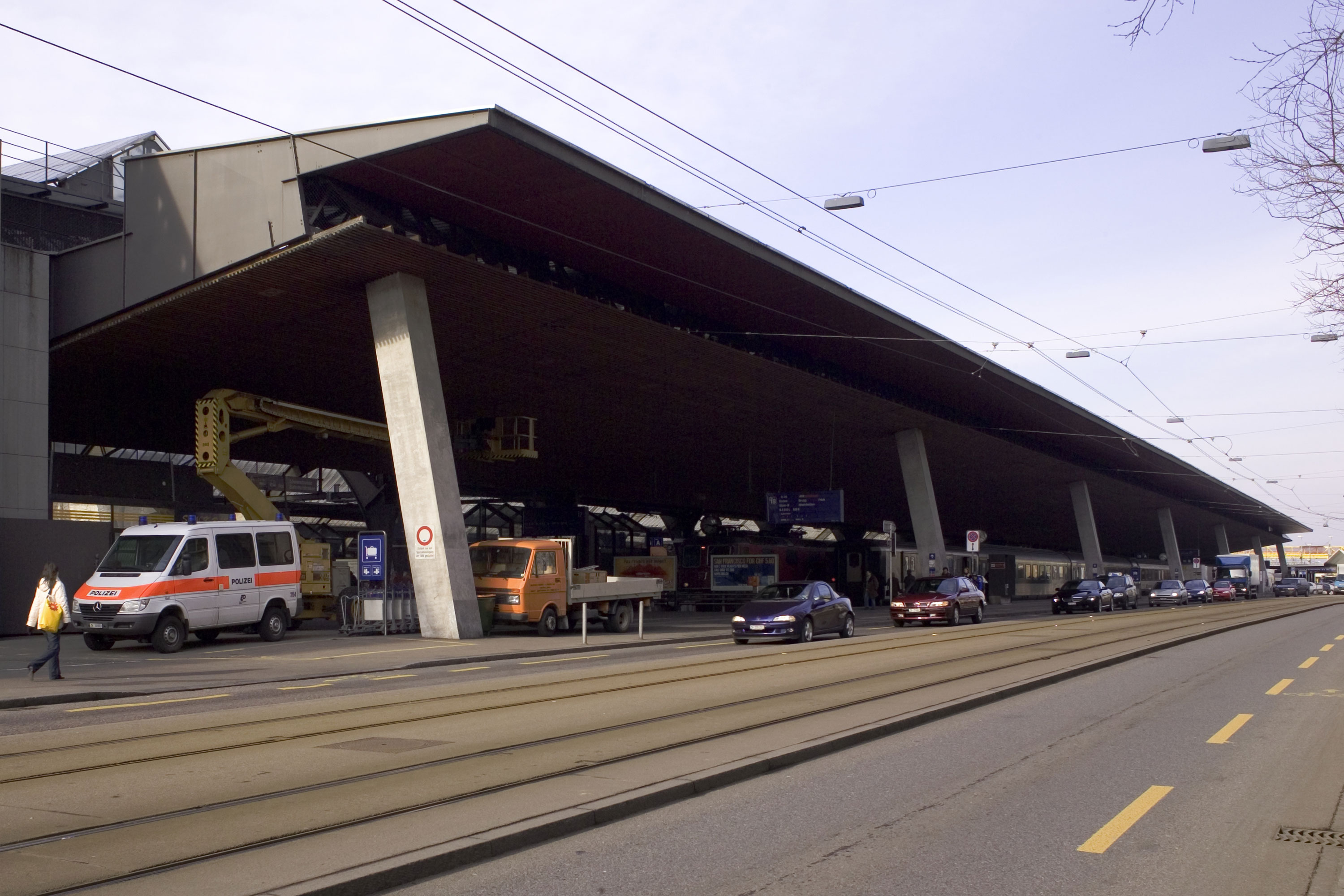 Zürich Hauptbahnhof, Seitendach entlang der Gleishalle (Seite Bahnhofplatz, 2005)